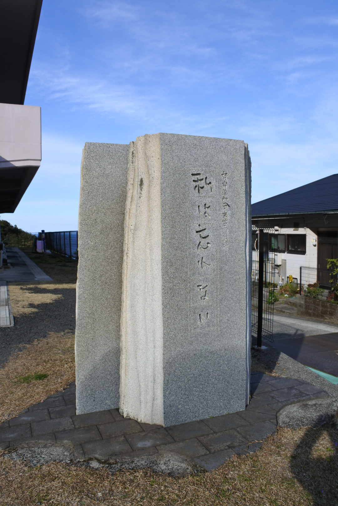 有吉佐和子「私は忘れない」の発表・映画公開を記念する碑。2017年2月、黒島。